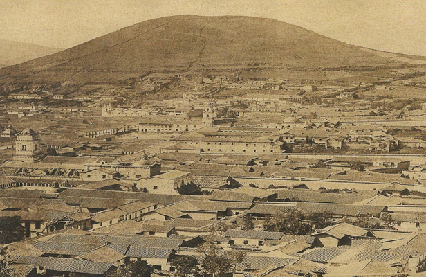 Vista panorámica del cerro Yavirac y en su base el Hospital Psiquiátrico San Lázaro